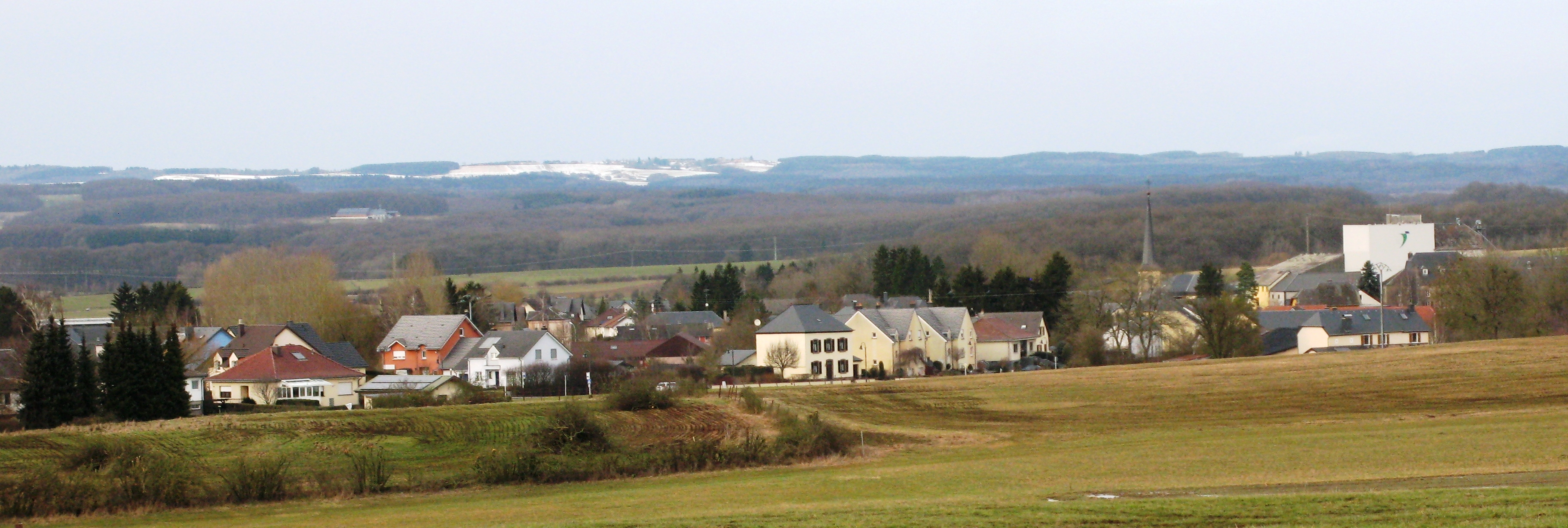 Näerden vum Héibierg aus gesinn. Naerden Naerden